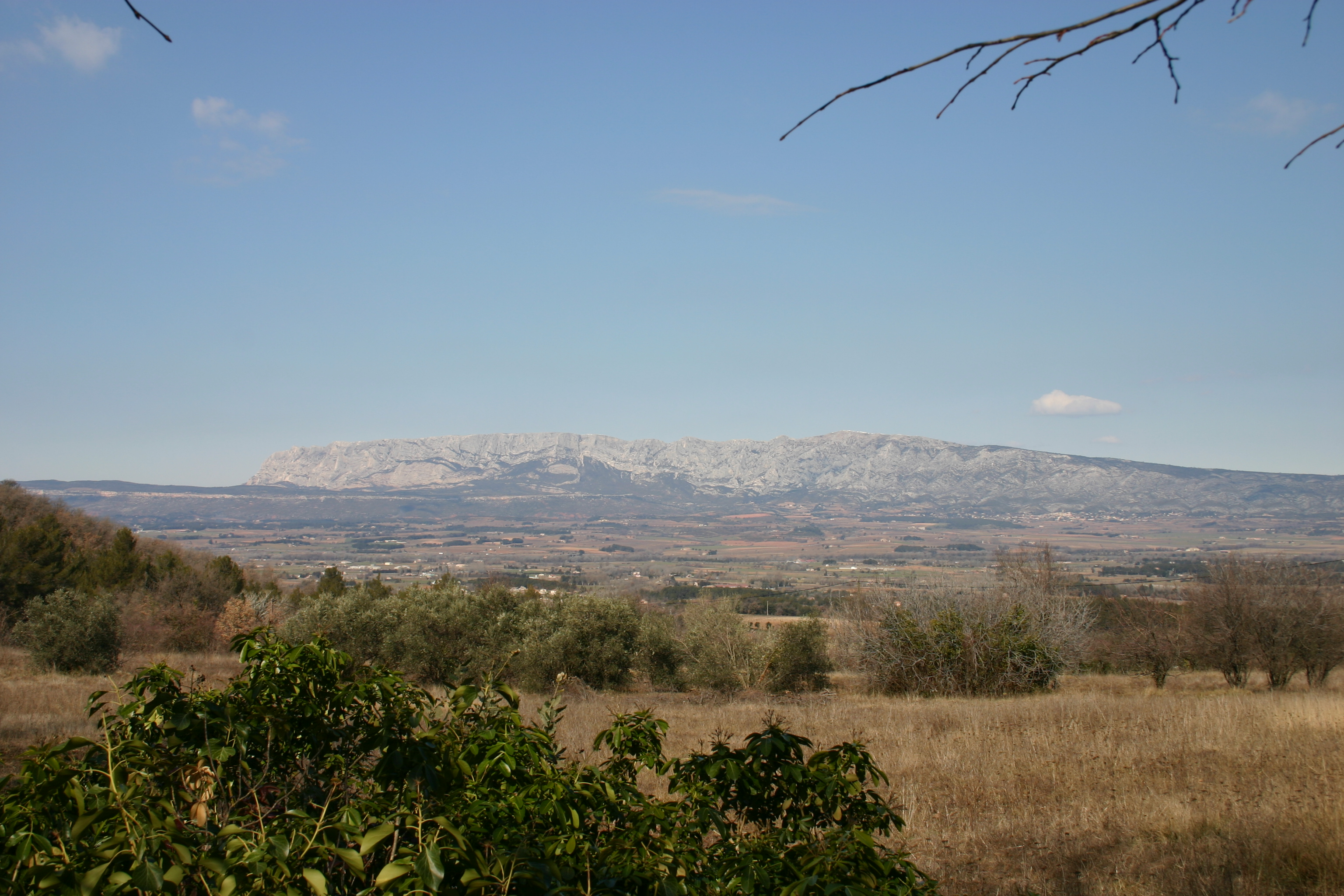 La Montagne Sainte Victoire vue de Trets.